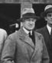 הנציב העליון הבריטי ג'ון צ'נסלור, ניצב חובש מגבעת במרכז, בעת ביקור באתר הבנייה של בניין ימק"א בירושלים